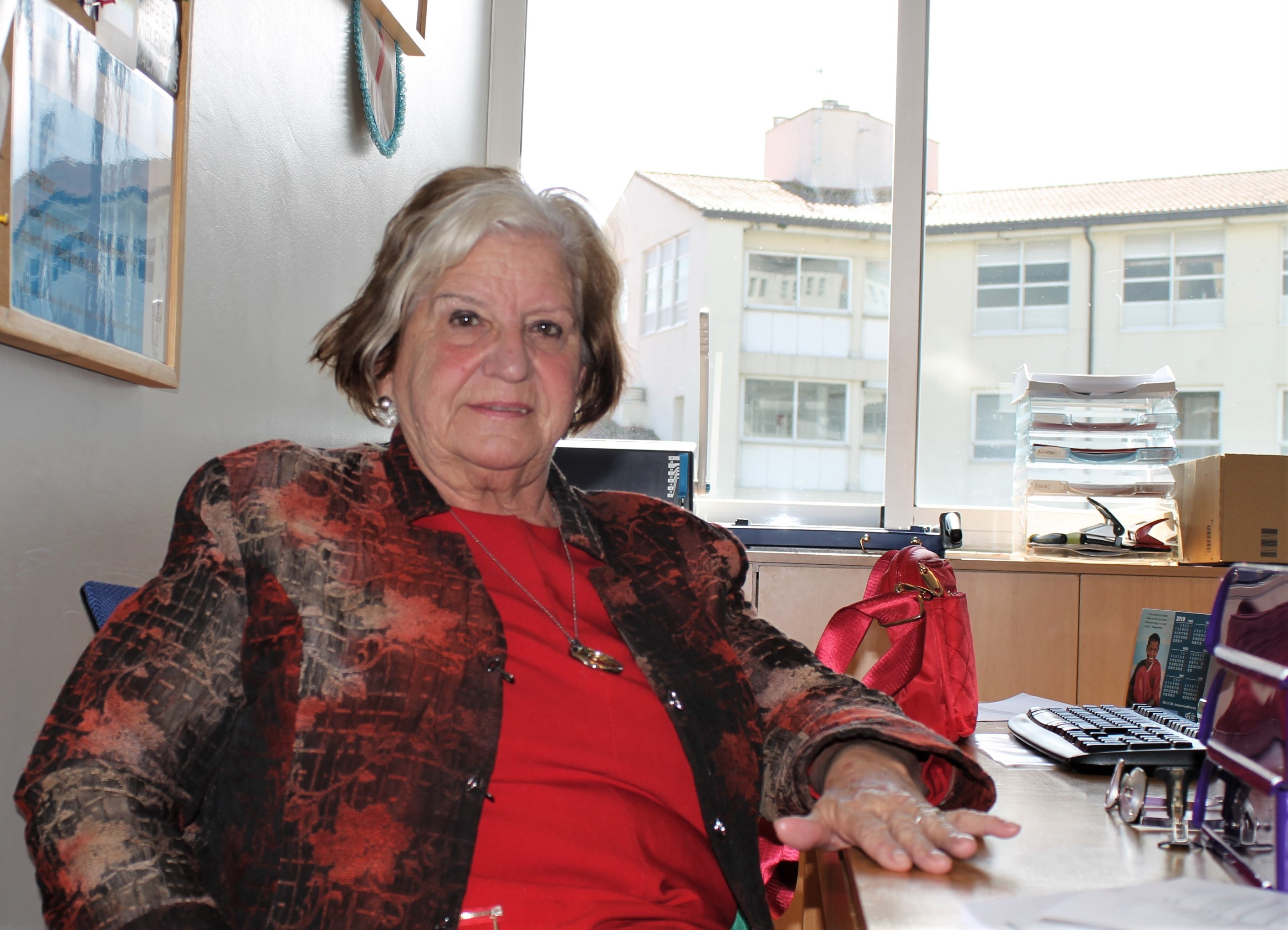 Ligada a los movimientos vecinales y sociales desde muy joven, Carmen Avendaño se cansó de ver morir a una generación ante la indolencia de los poderes públicos y se convirtió en uno de los símbolos de la lucha contra el narcotráfico en Galicia